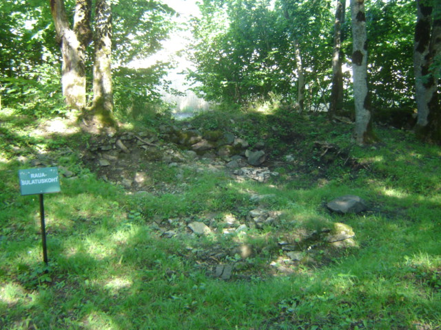 Rauasulatuskoht